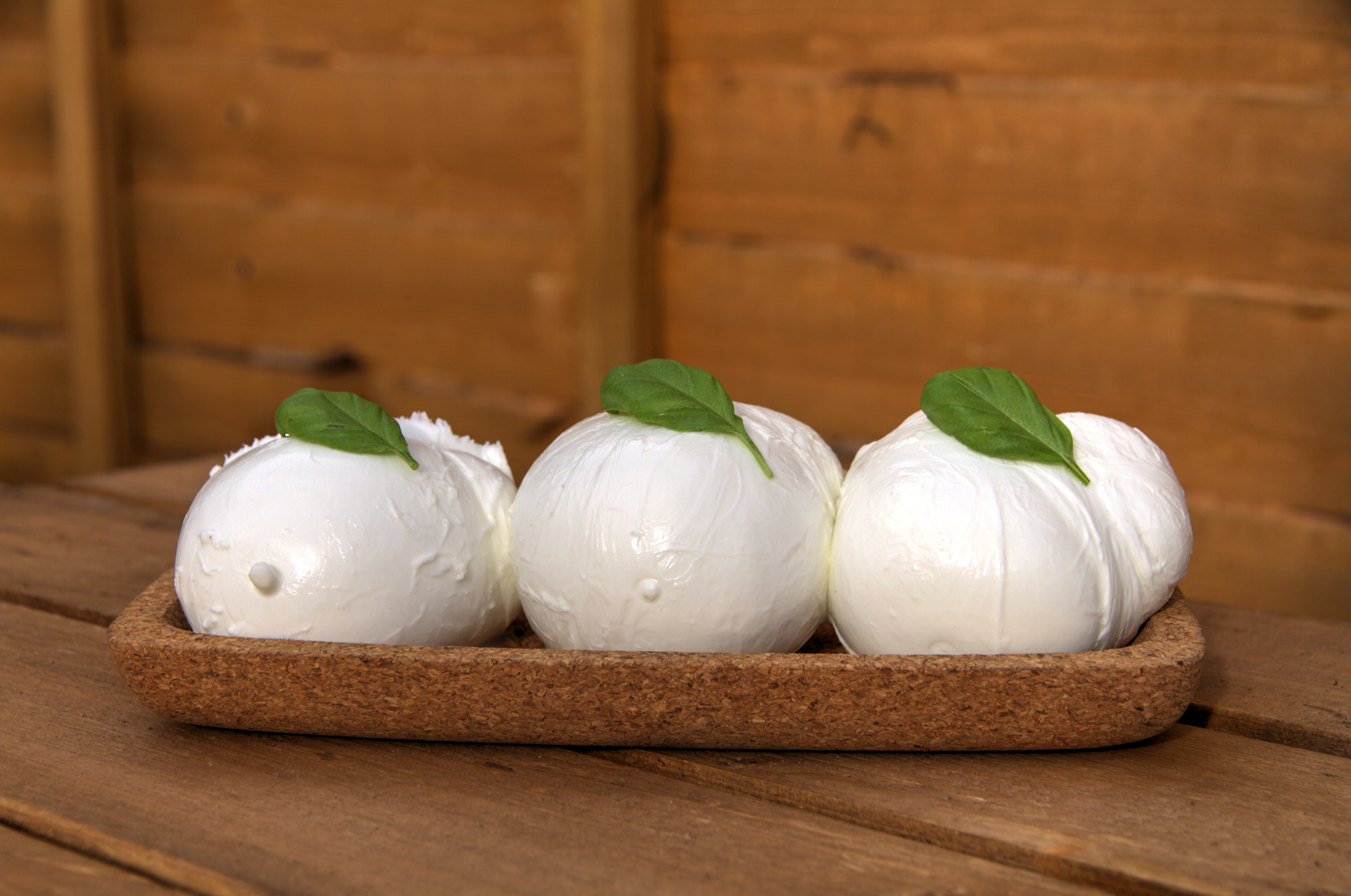 Three mozzarella balls on the toast in European restaurant